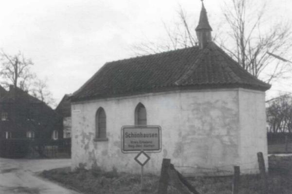 Bild der Alten Kapelle Schönhausen in Jahre 1969 kurz vor dem Abriß